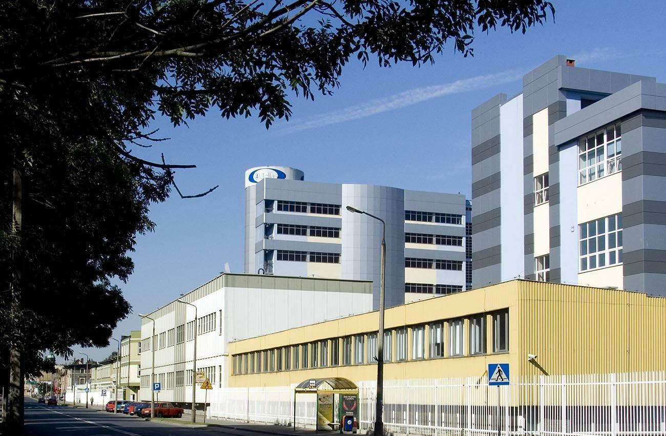 Część produkcyjna i biurowa Jelfy. Ten najwyższy budynek w środku to magazyny.